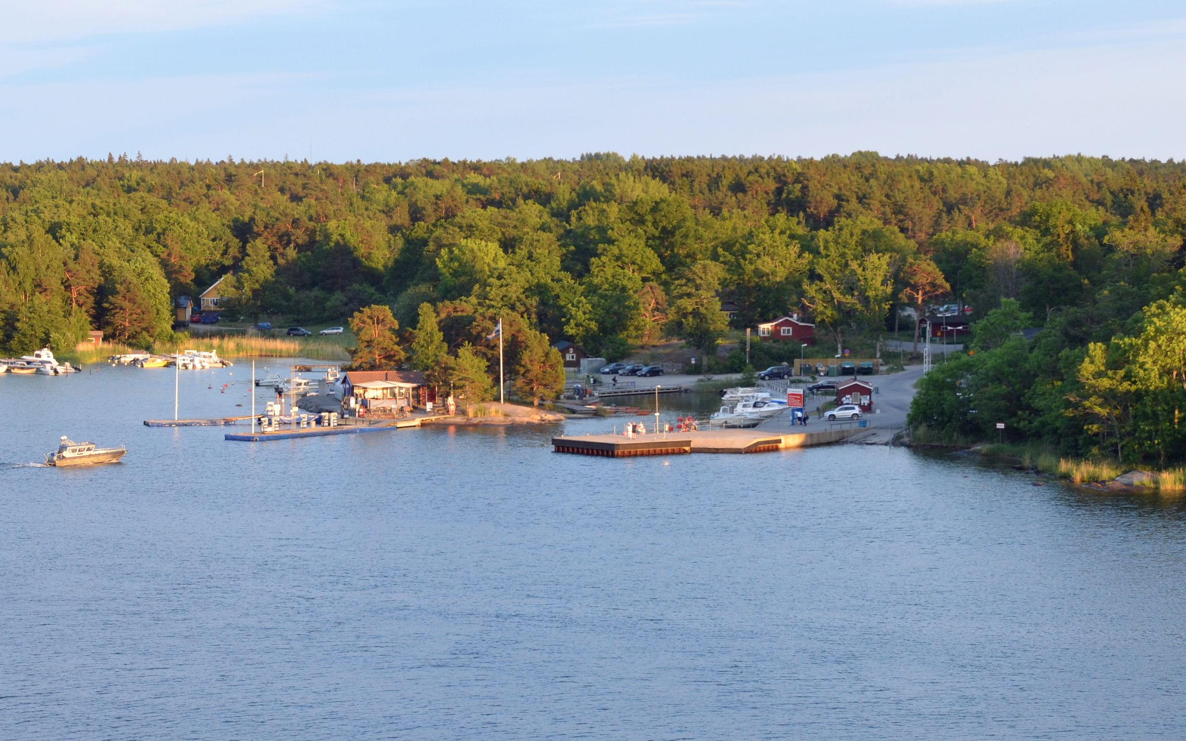 Sollenkroka brygga på Vindö